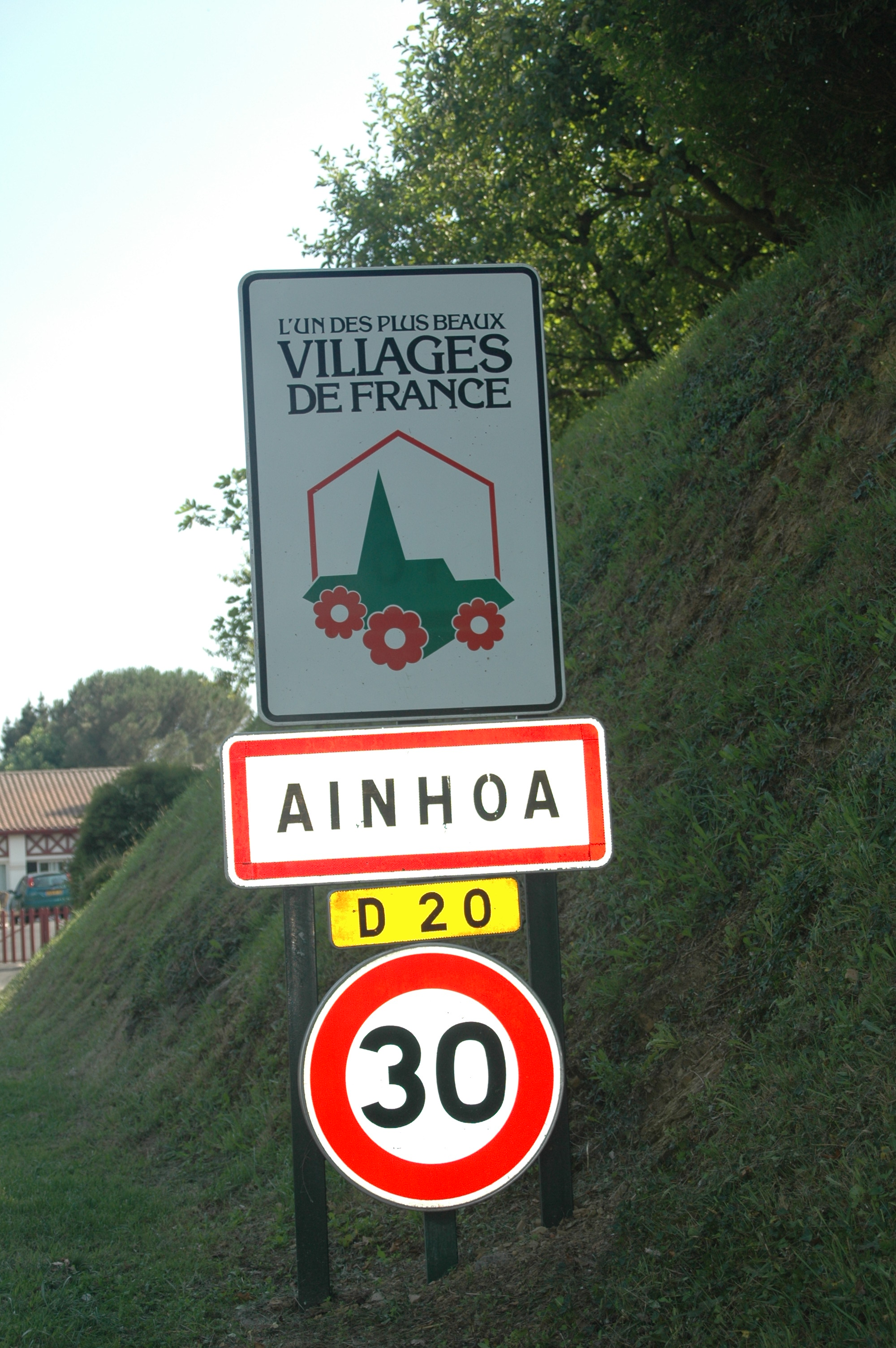 Ainhoa, panneau à l'entrée du village, photo prise le 08/07/06 par Harrieta171